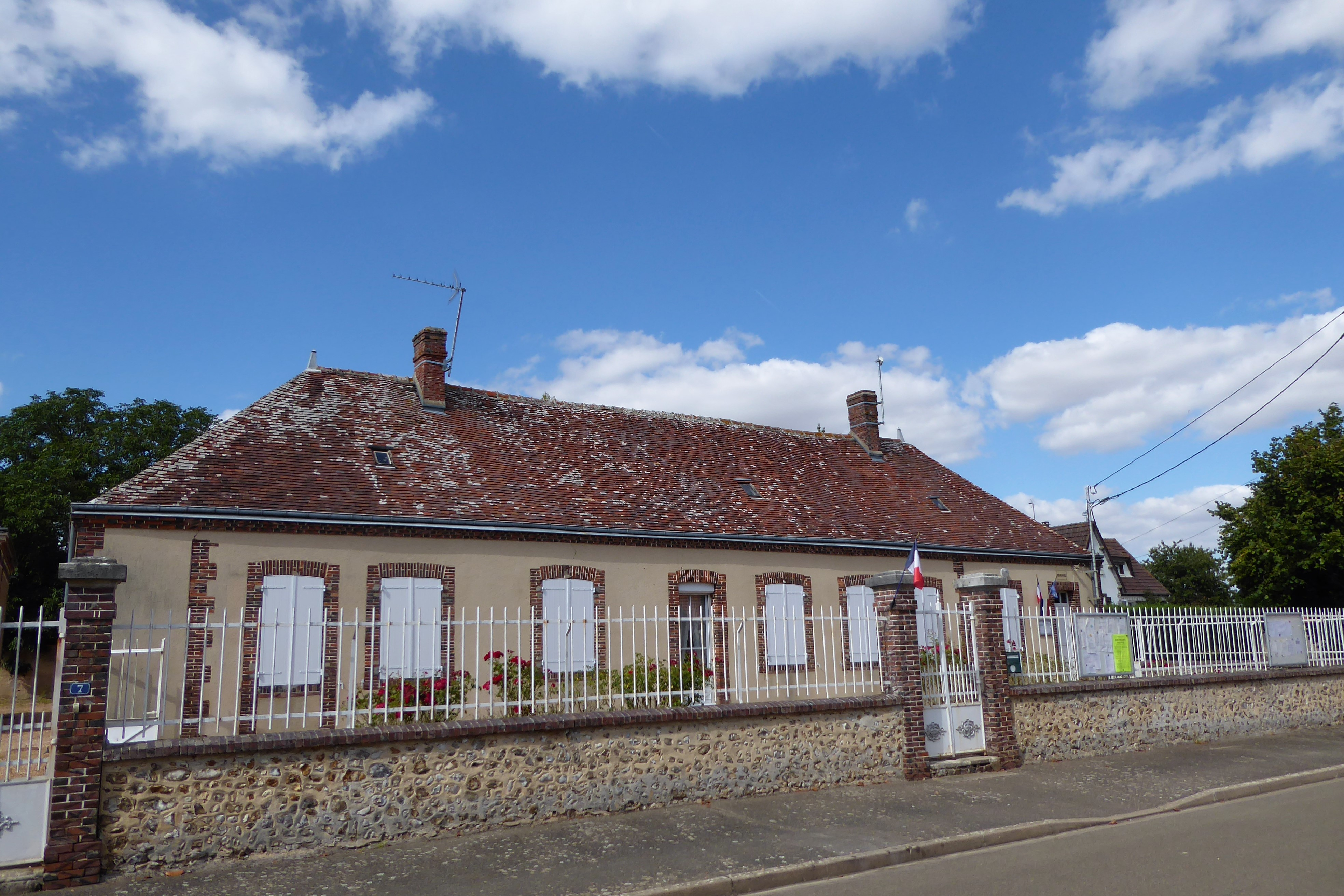 Orrouer-mairie, Eure-et-Loir (France).